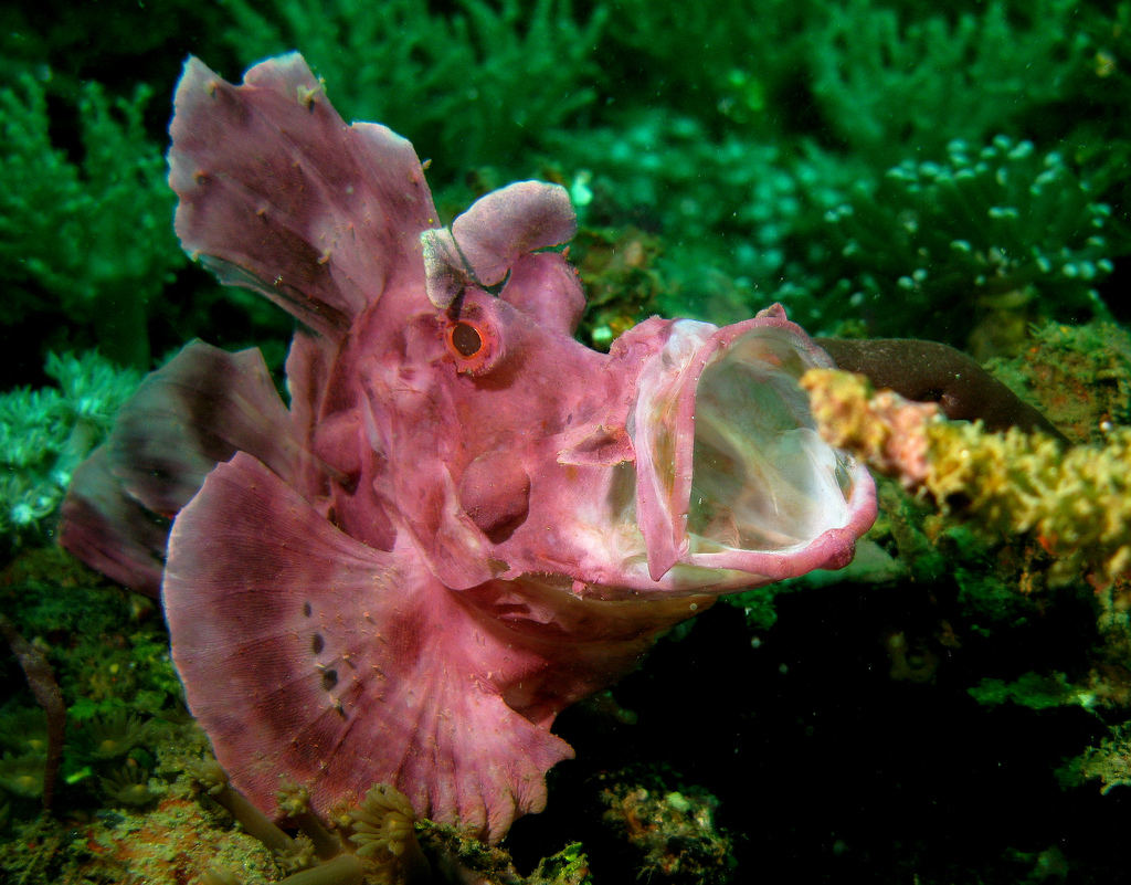 Rhinopias